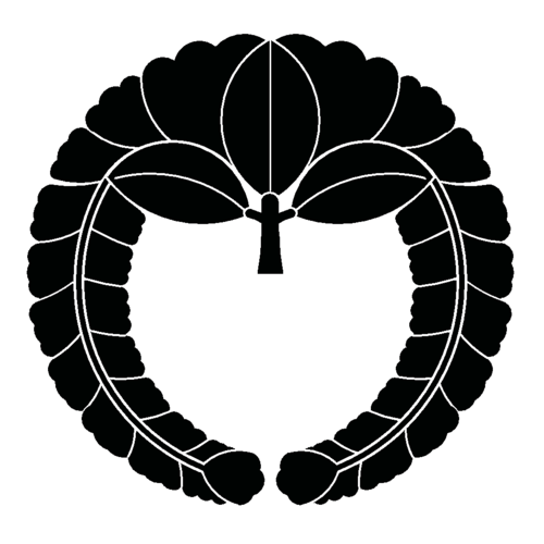 Sagari Fuji, Japanese crest